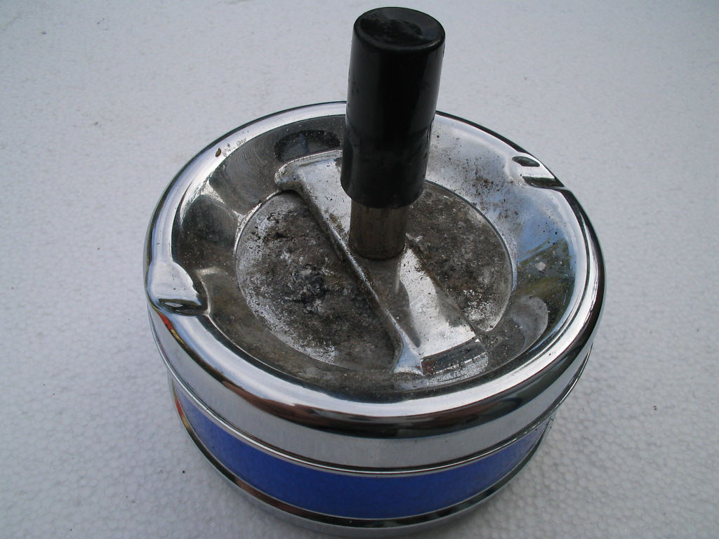 asbak, 2004